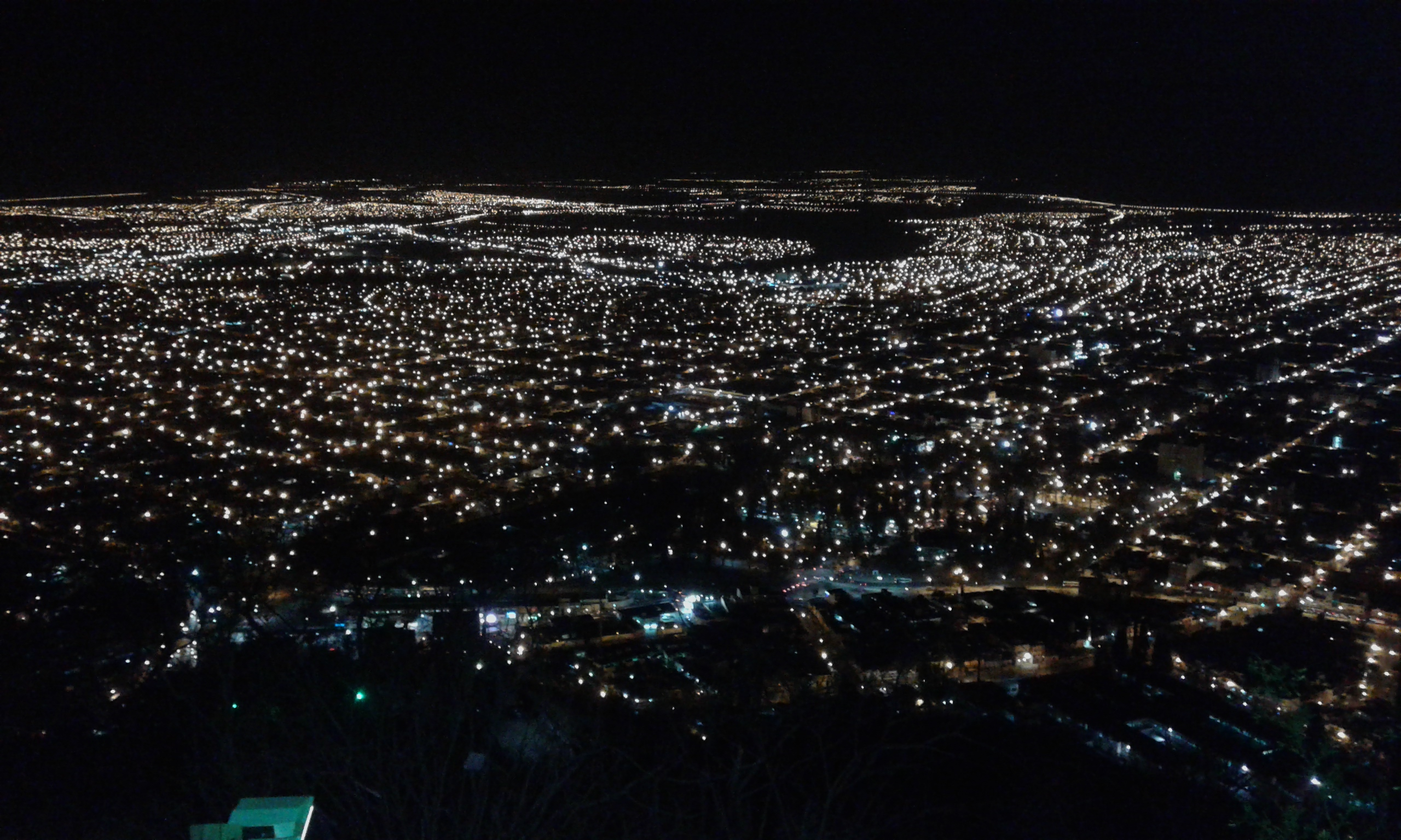 La vista de Salta la Linda, desde el Cerro San Bernardo